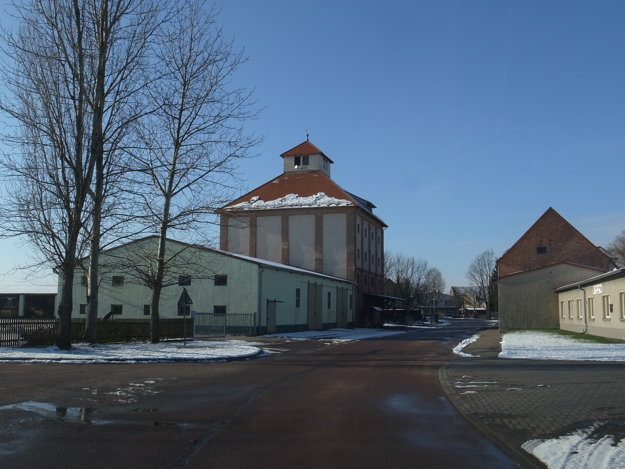 Buhlendorf, Speicher